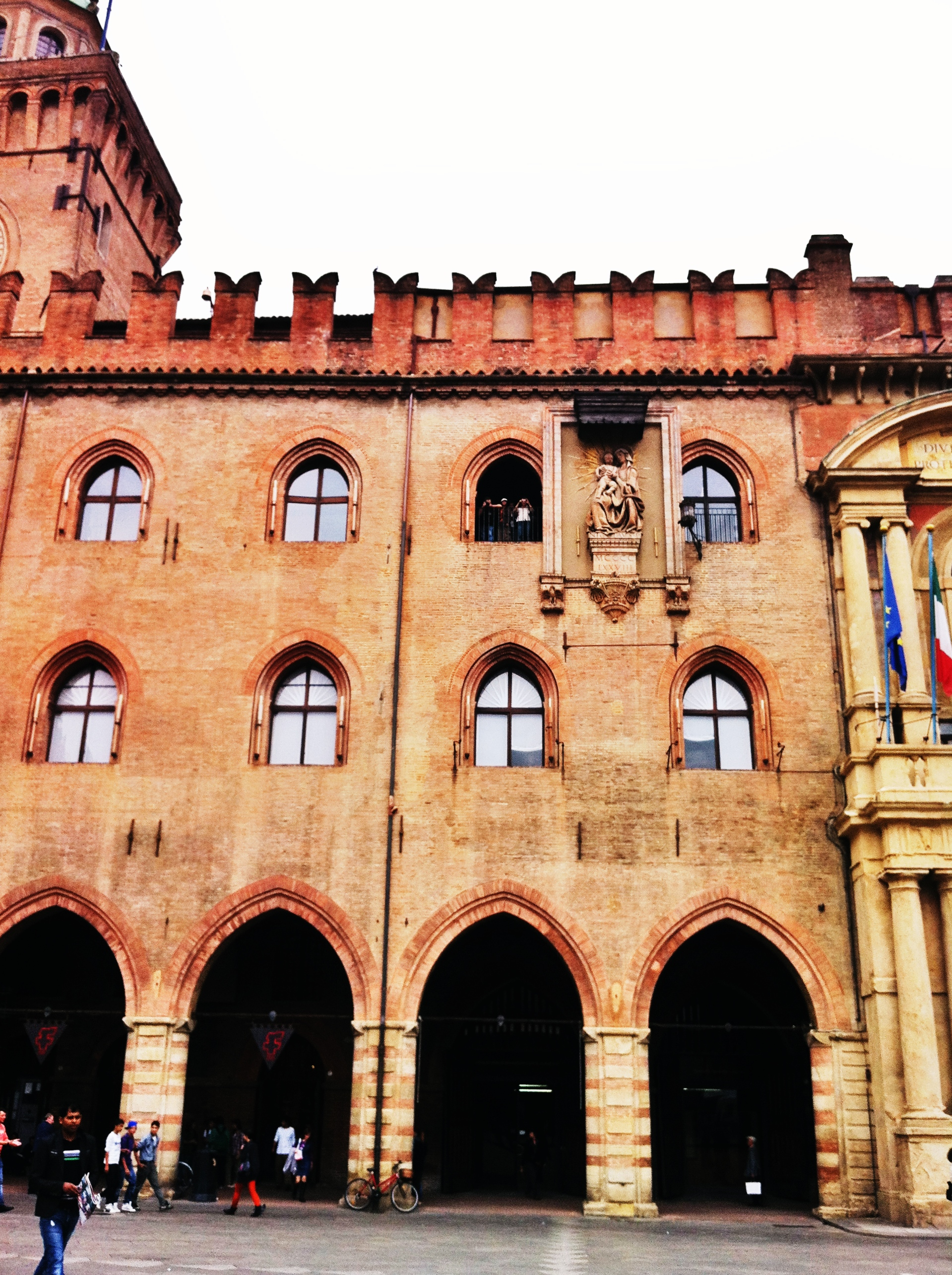 Palazzo d'Accursio in piazza Maggiore a Bologna This is a photo of a monument which is part of cultural heritage of Italy.